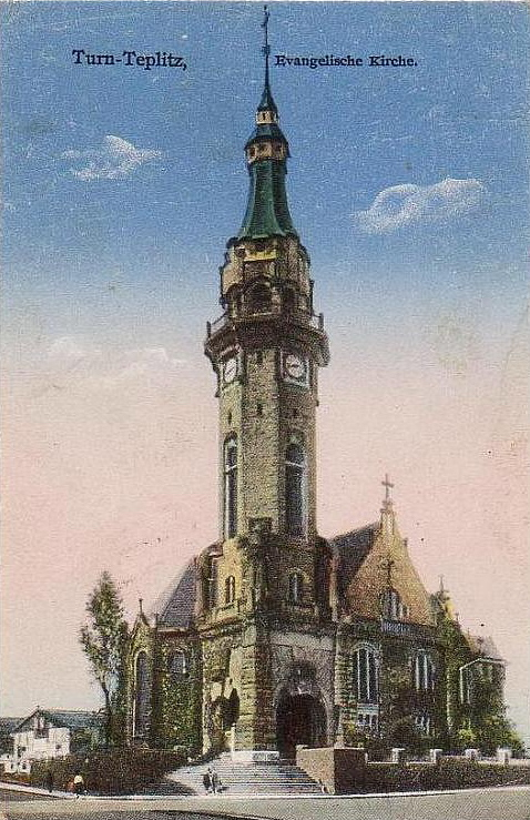 Evangelický kostel v Trnovanech.